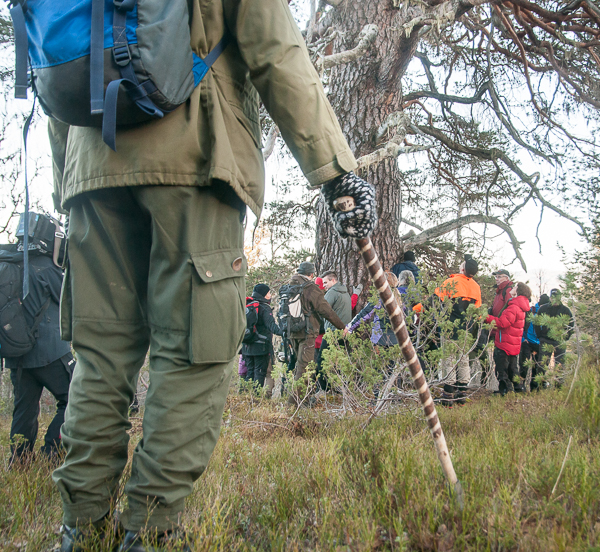 Bjønnafurua "avdukning" etter fullført oppmåling.